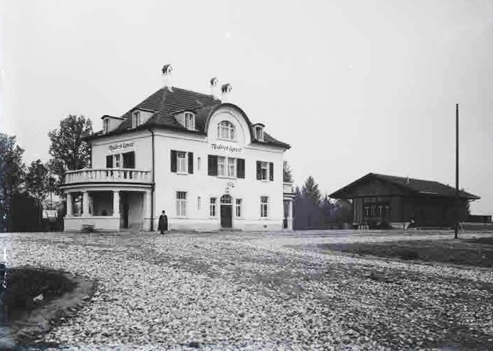 Stationsgebäude Neukirch-Egnach nach der Fertigstellung